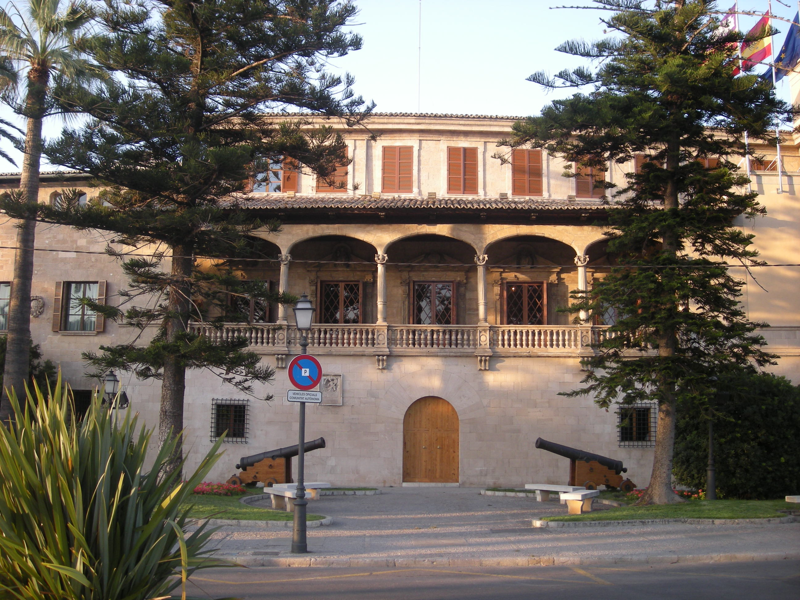 Consolat de Mar. Palma.